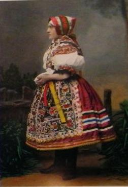 Charváti ženský kroj